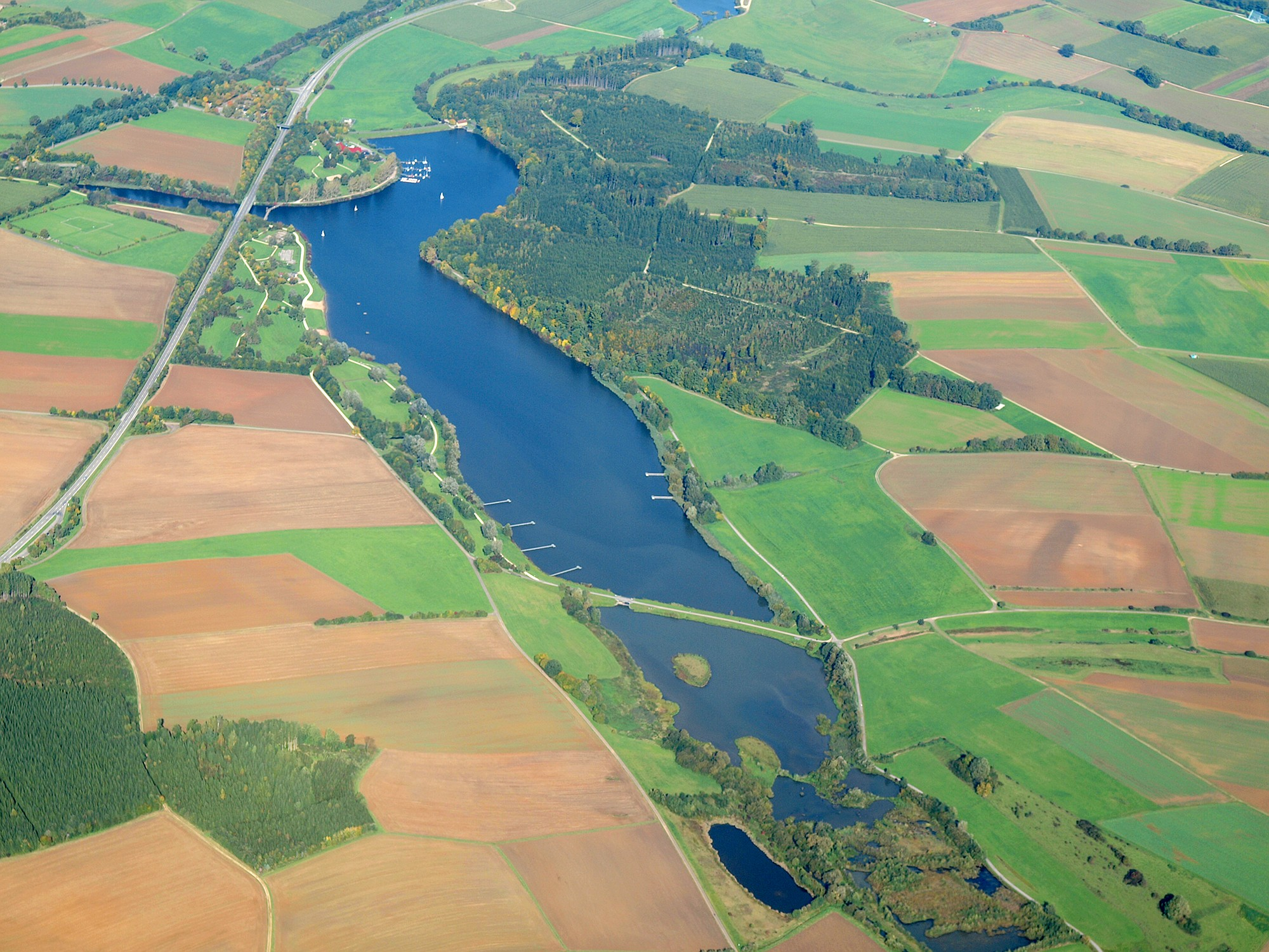 Bucher Stausee, Luftbild von Südost